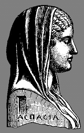 Aspasia